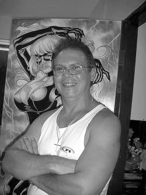 Alvaro Araújo Lourenço do Rio (Fortaleza, 19 de maio de 1962 — Fortaleza, 31 de janeiro de 2012)